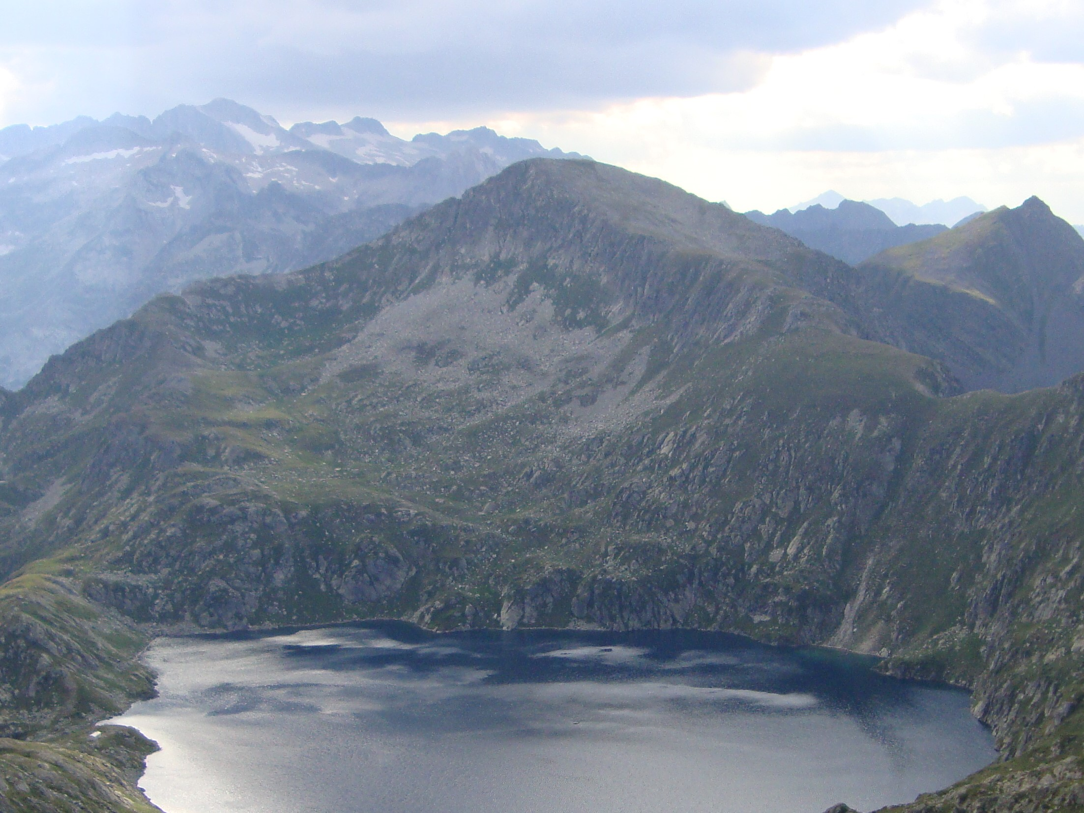 Vista del Pico del Pòrt de Vielha y el Estanh Redon